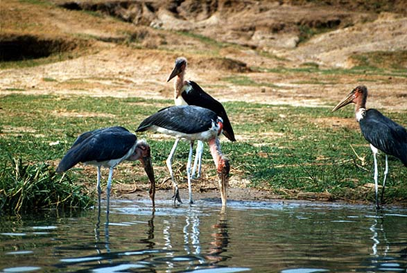 Marabus (Leptoptilos crumeniferus) - "Foto-album Ruwenzori 1989, Vuilnismannen in Ishango: Maraboes"